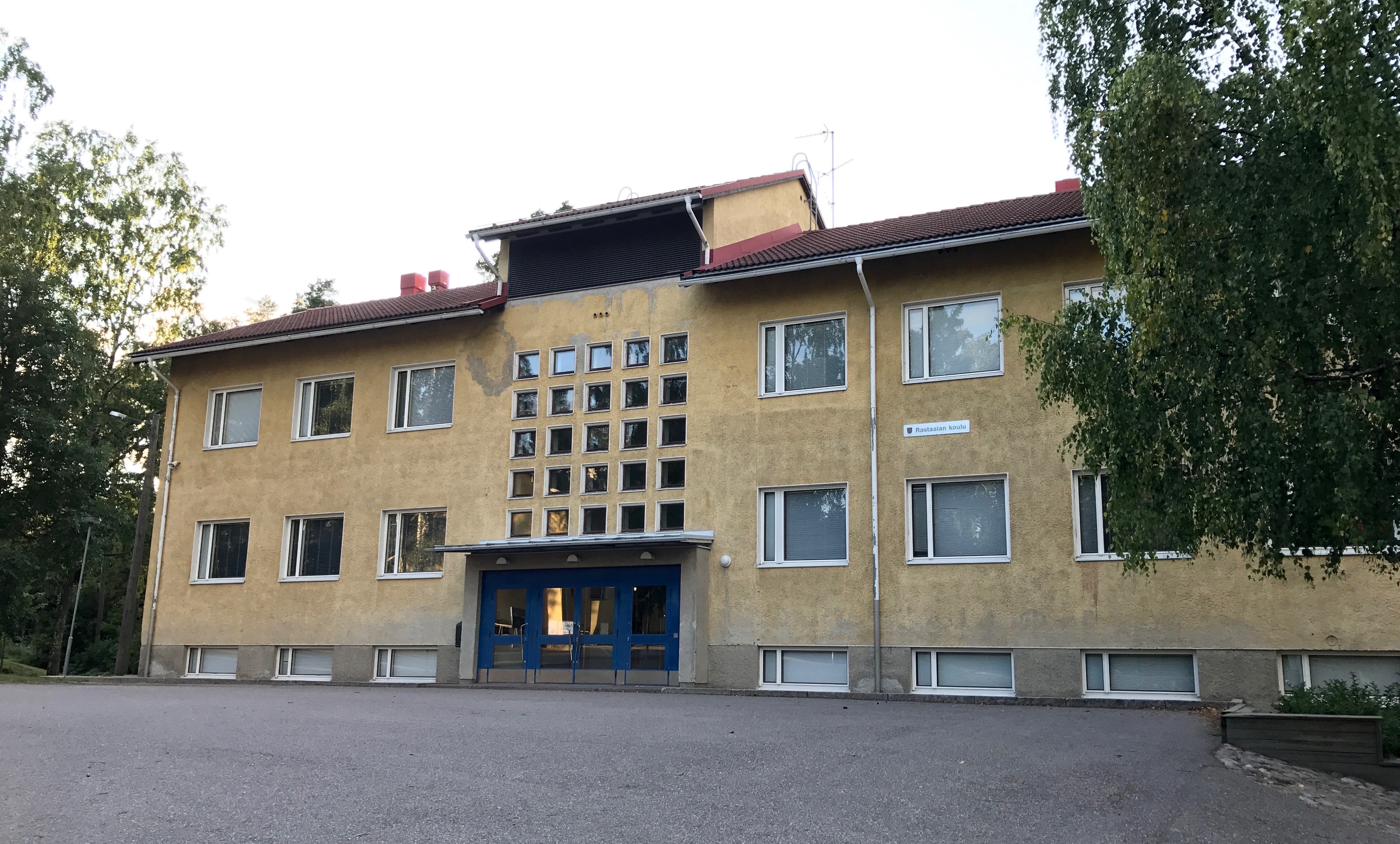 Rastaalan koulu Espoossa